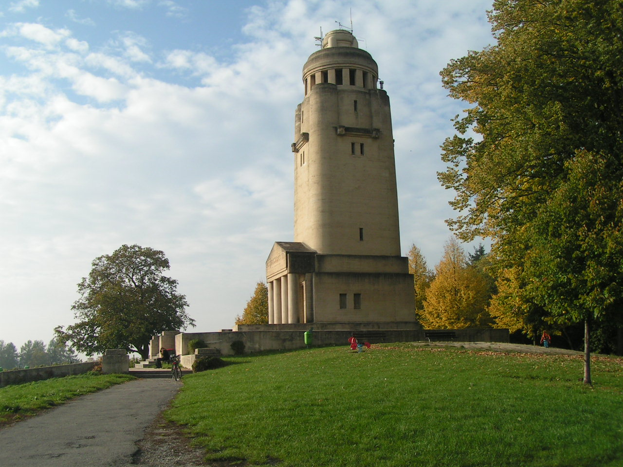 Bismarckturm Konstanz Sonstiges